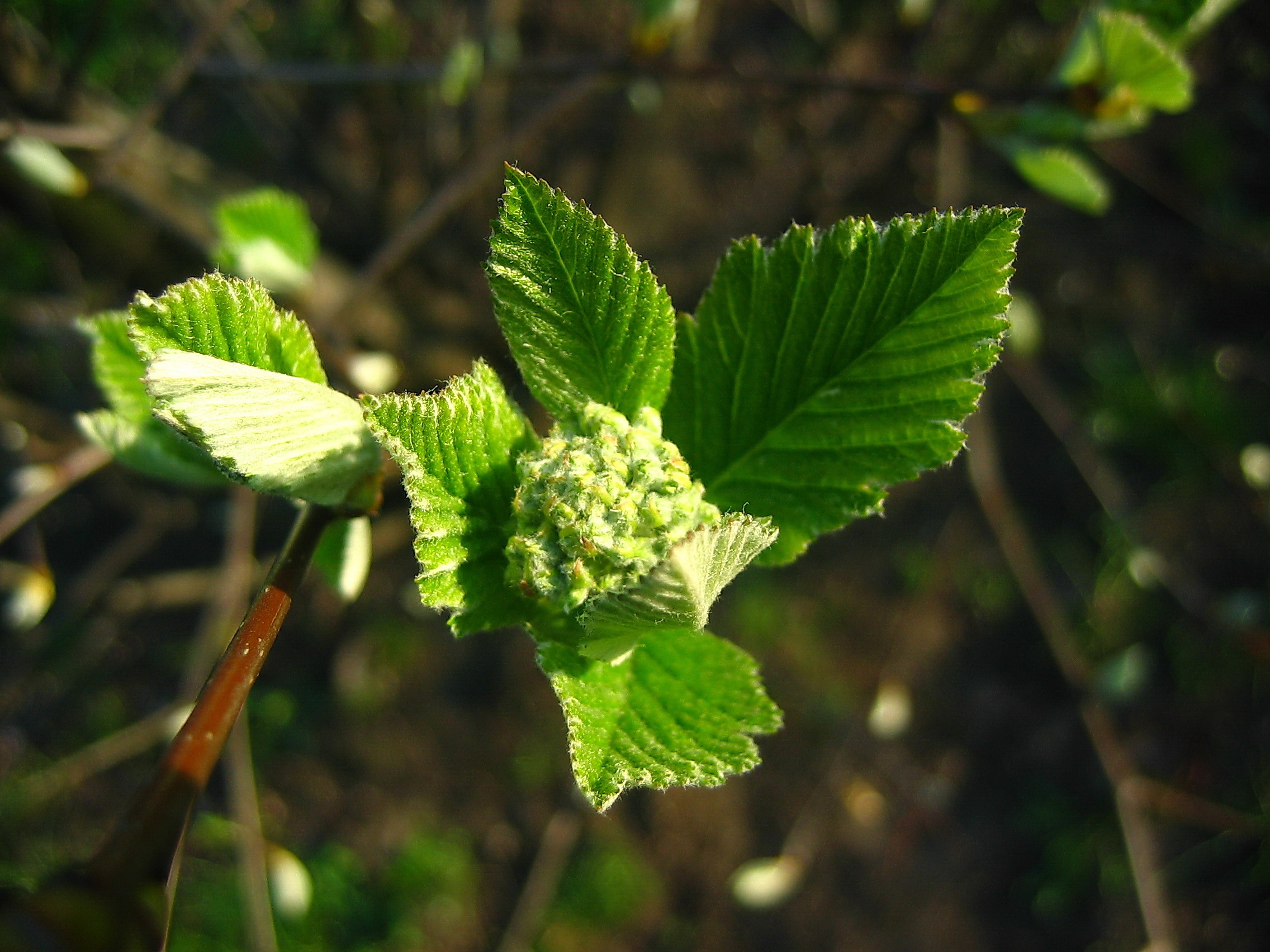 Jarząb mączny